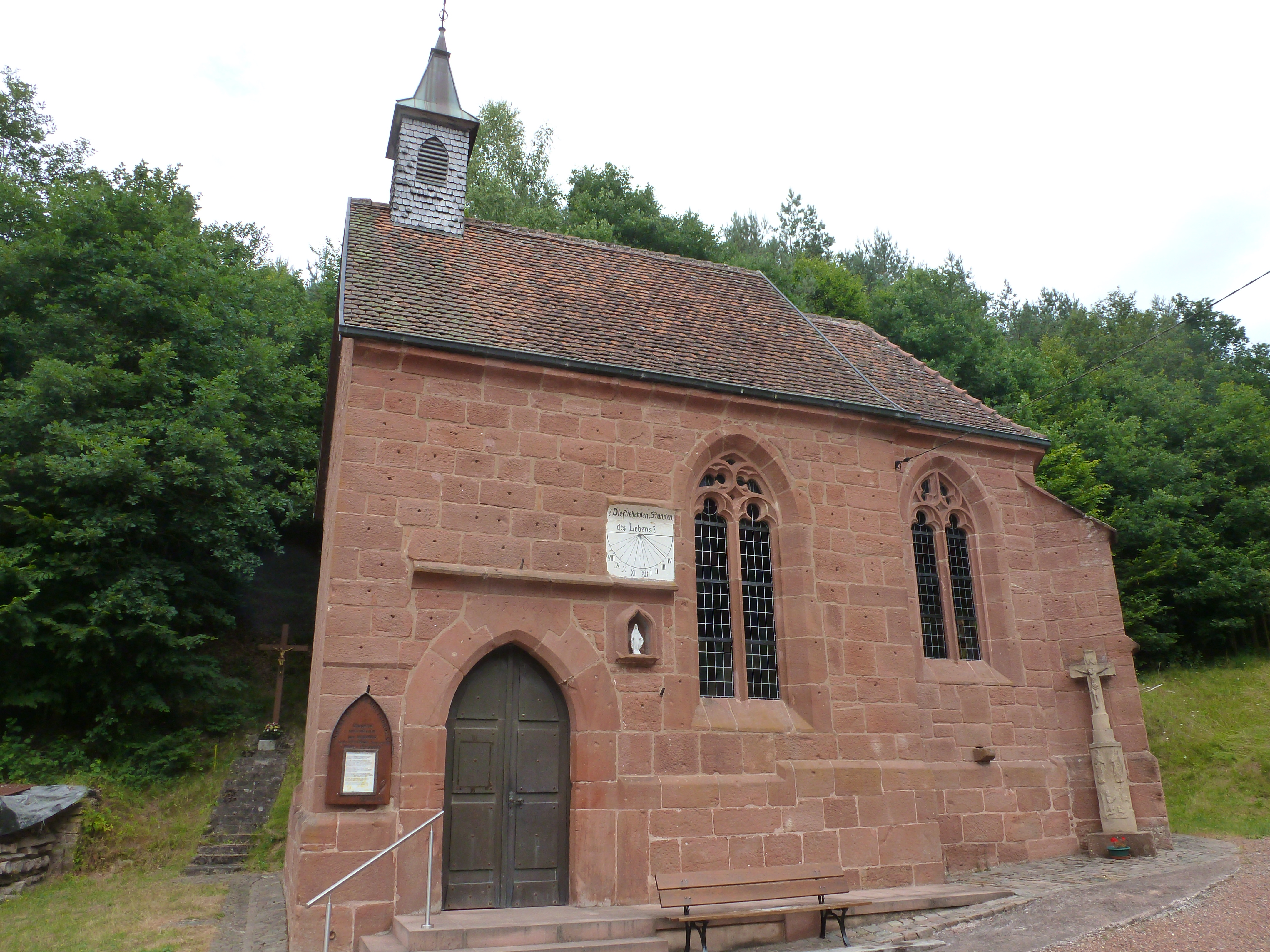 Chapelle Notre-Dame à Mouterhouse (Moselle, Lorraine, France).